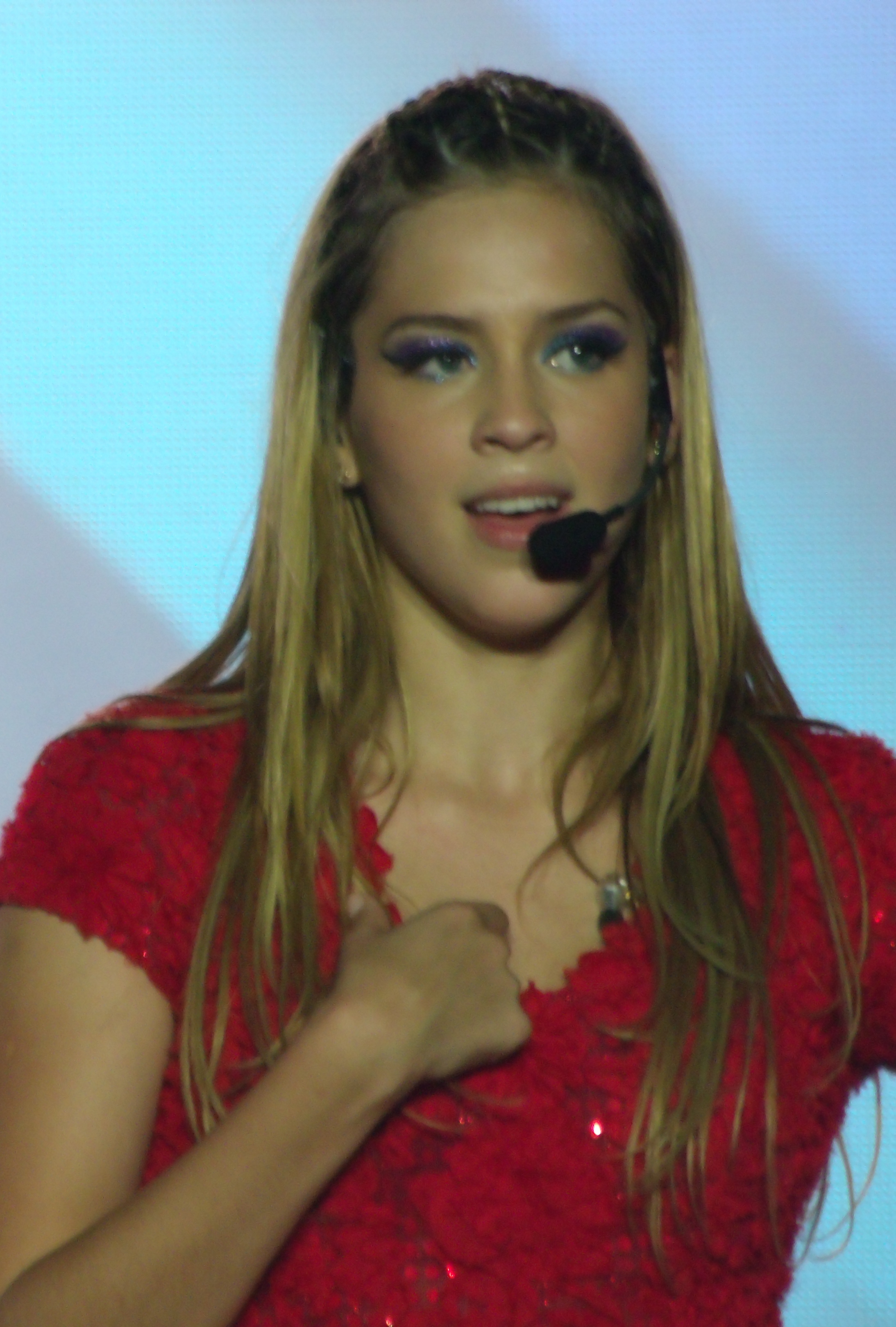 Sophia no show de Rebeldes em Porto Alegre!